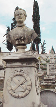 Ludmilla Assings Grabbüste von Cesare Sighinolfi, 1880, Friedhof Via Senese, Firenze